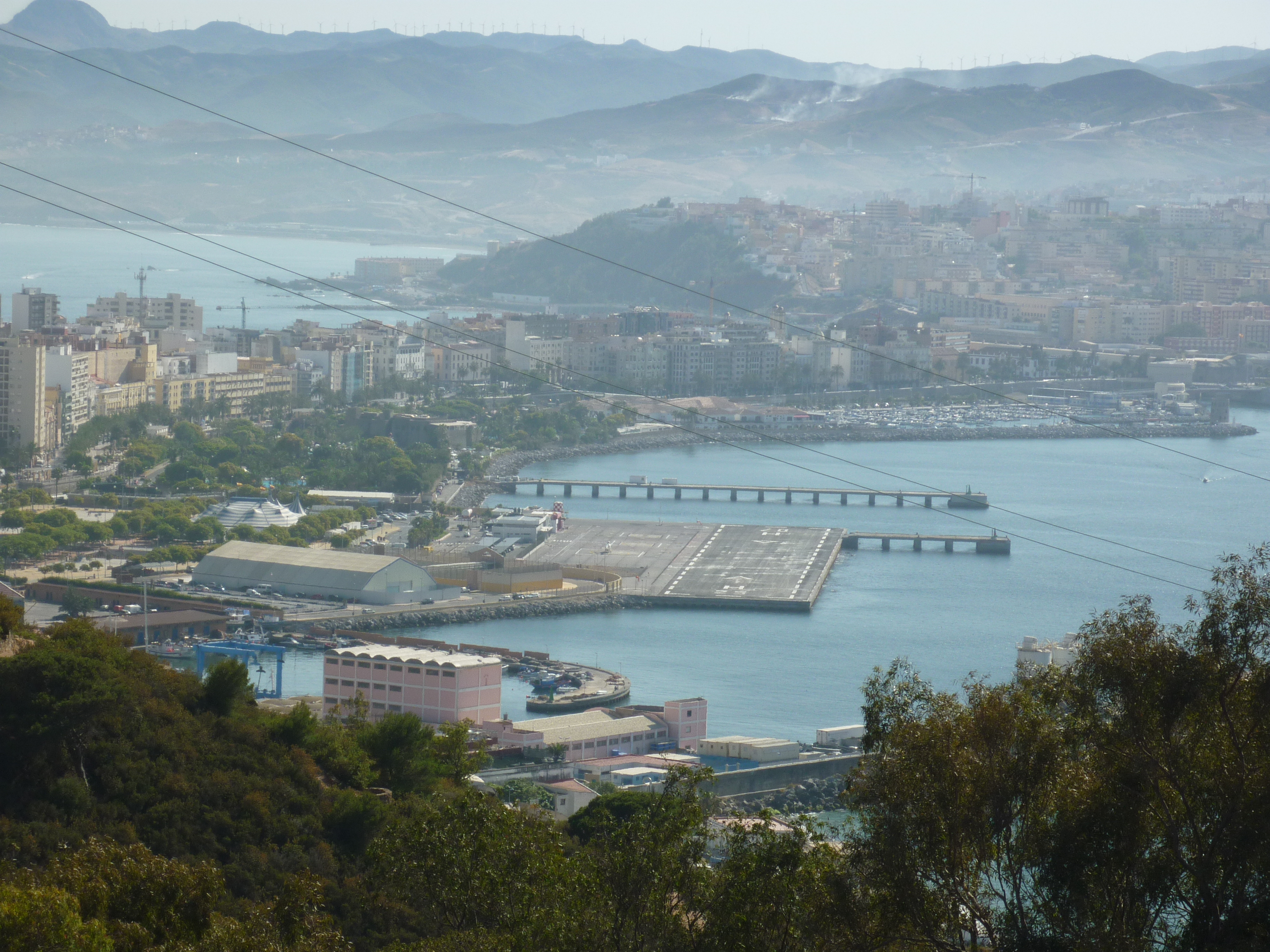 Fotografías de Cañete